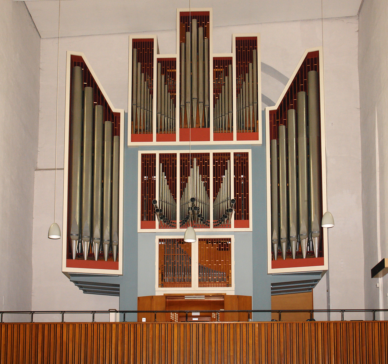 St. Stephani in Bremen: Beckerath – Orgel, Einweihung 10. April 1965